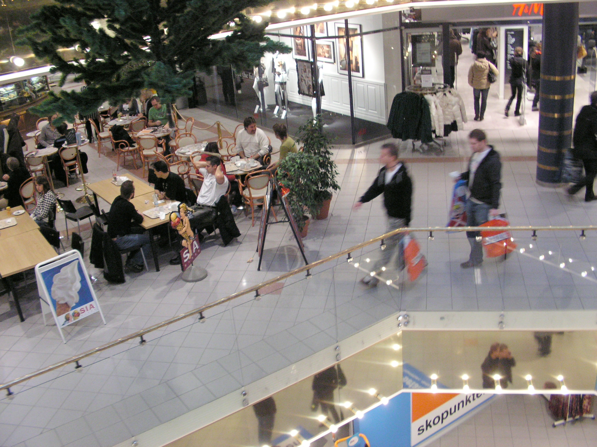 Inside Siba-huset, Överby.